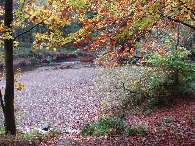 Bedburn Beck in autumn, Hamsterley Forest